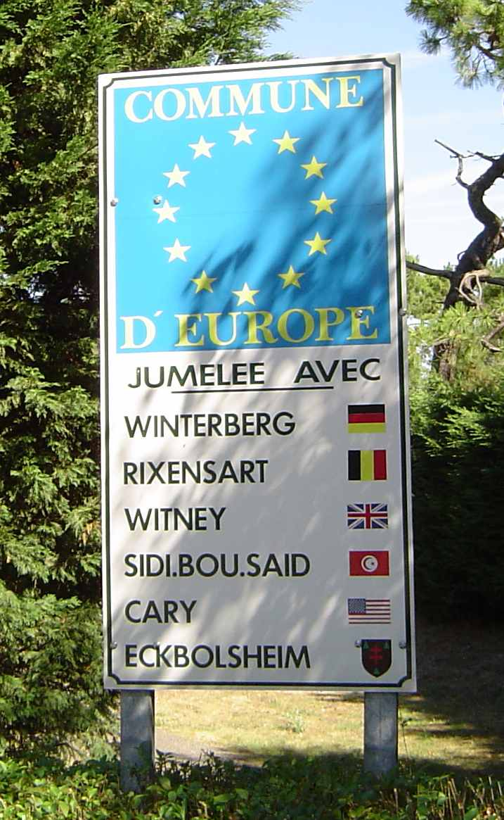 Photo prise par moi-même au Touquet le 30 juillet 2006